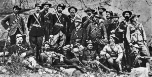 Bittereinders te velde